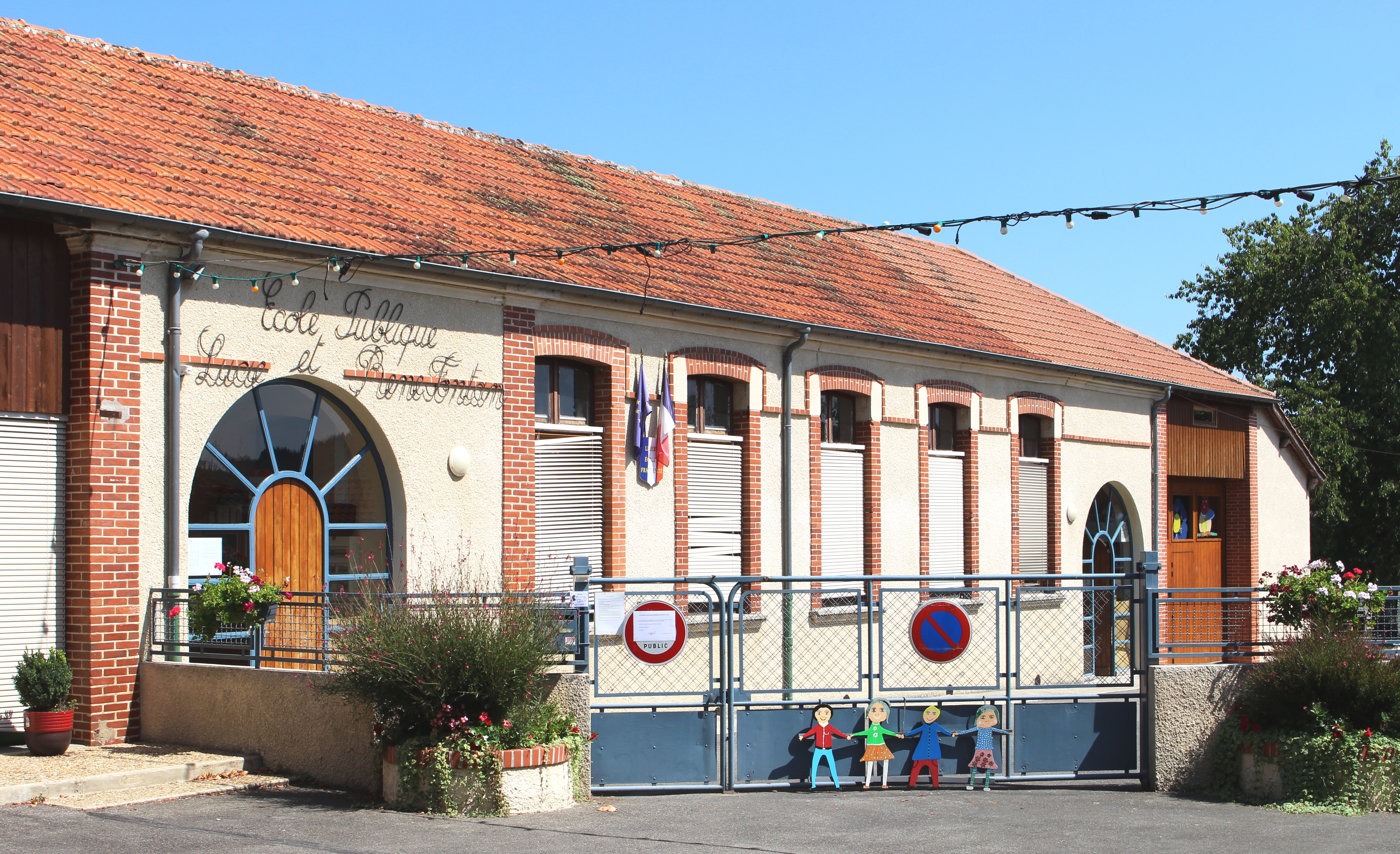 École de Lascazères (Hautes-Pyrénées)